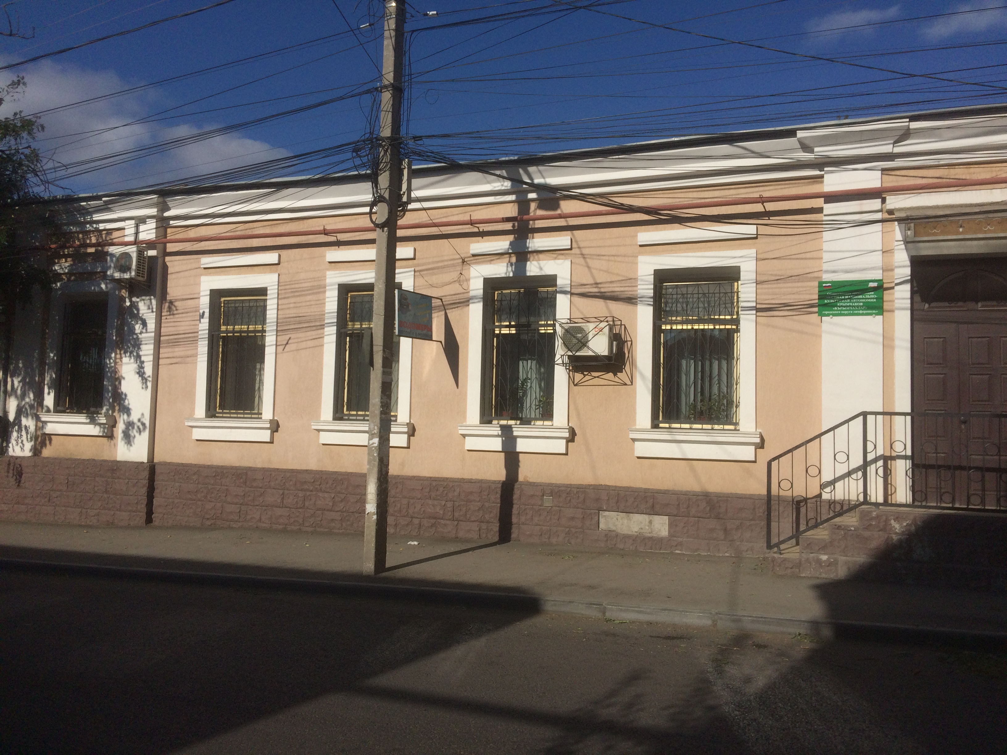 ул. Крылова, 54